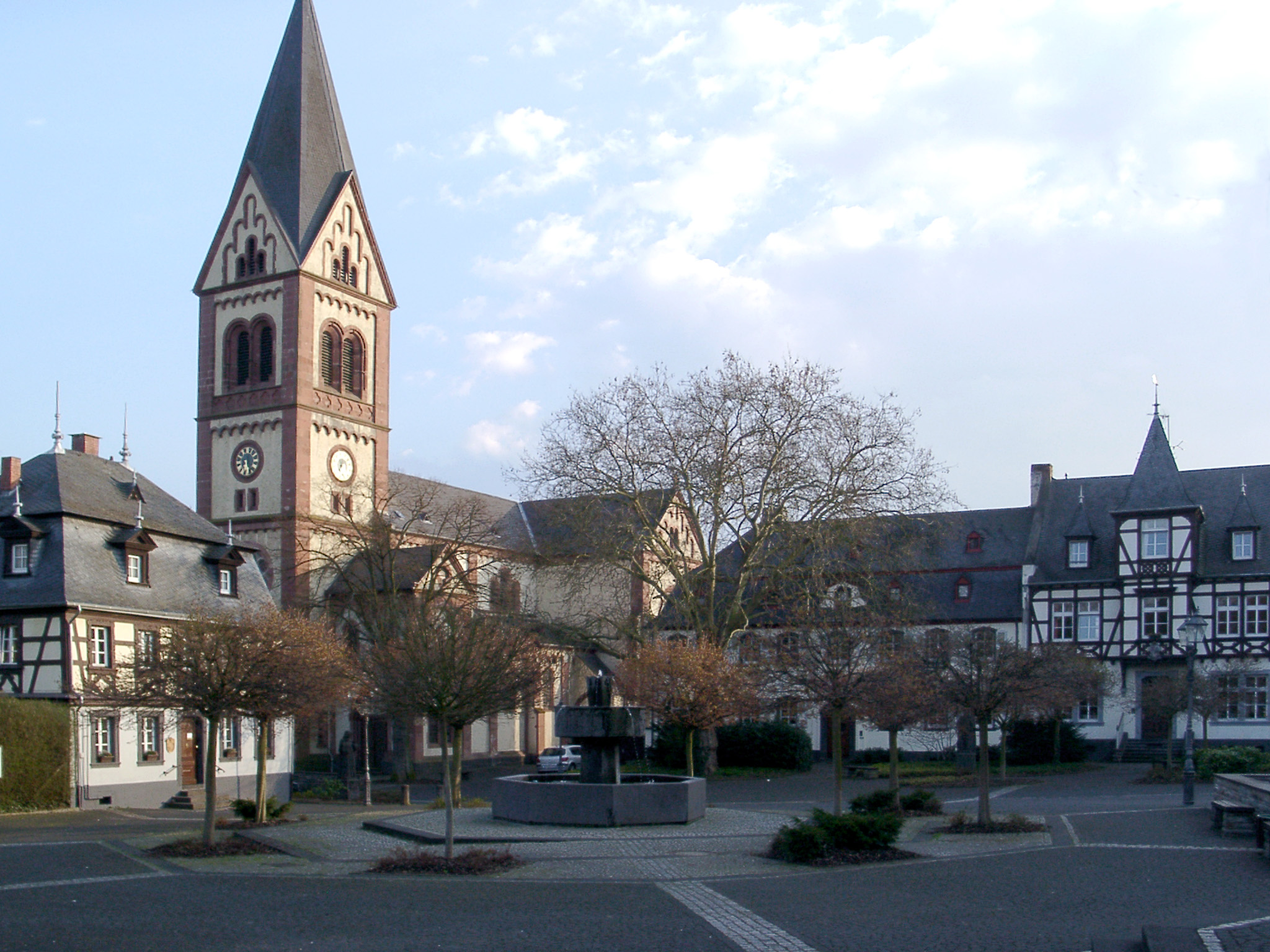 Bassenheim Ortsmitte mit Kirche - selbst fotografiert (Klaus Graf) 3.4.2005 - Lizenz: CC-BY